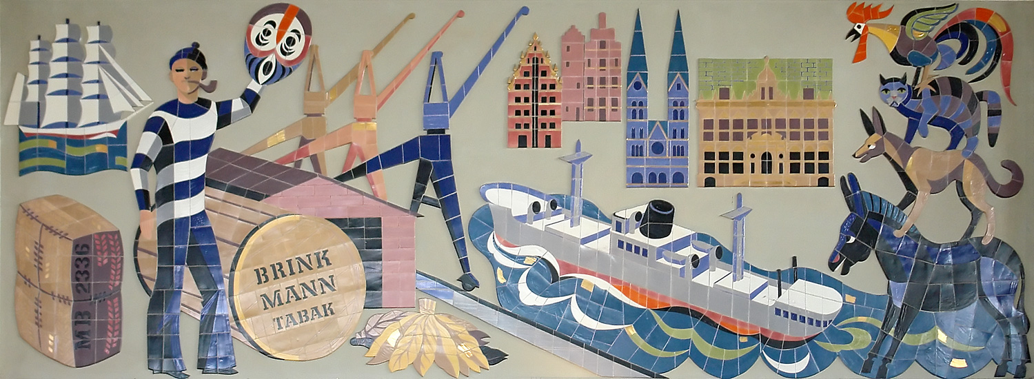 Bremen Hauptbahnhof: Wandmosaik der Bremer Zigarettenfabrik Martin Brinkmann AG von 1951. Teilbild Mitte (Aufnahme perspektivisch korrigiert)